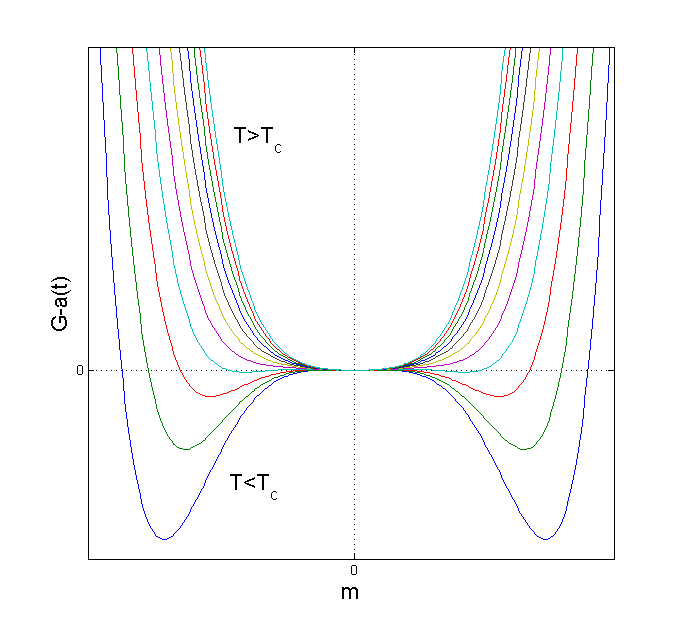 האנרגיה החופשית כפונקציה של פרמטר הסדר עבור טמפרטורות שונות במעבר פאזה לא רציף